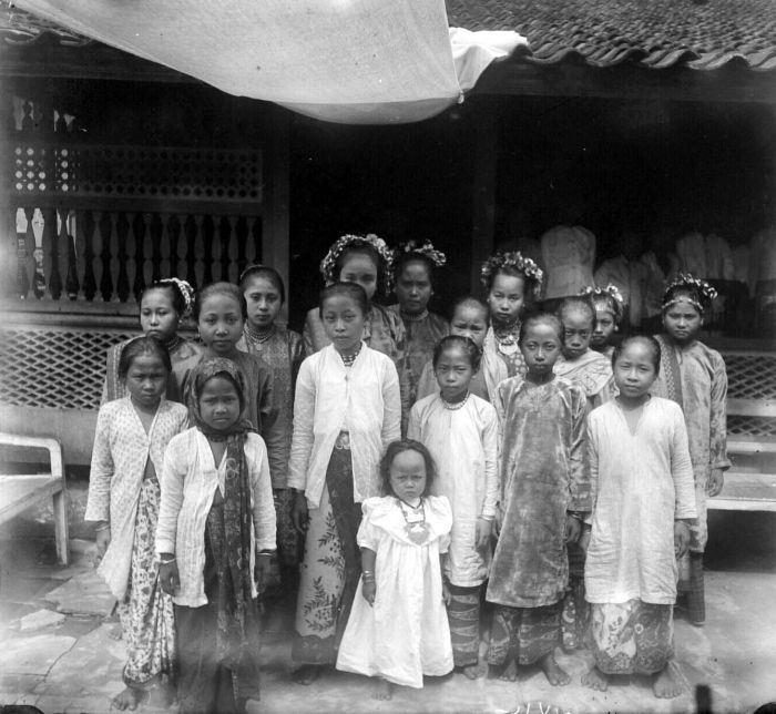 Negatief. Feestelijke samenkomst te Sekayu, Palembang, Zuid-Sumatra